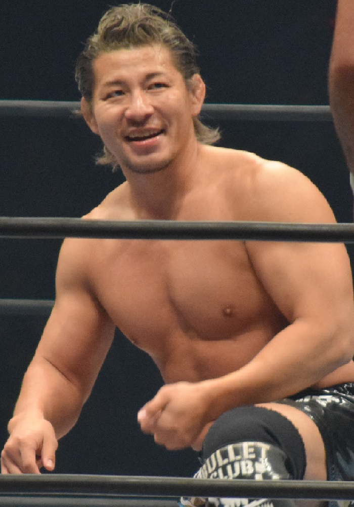 2016年11月5日 大阪府立体育会館「POWER STRUGGLE」 高橋裕二郎